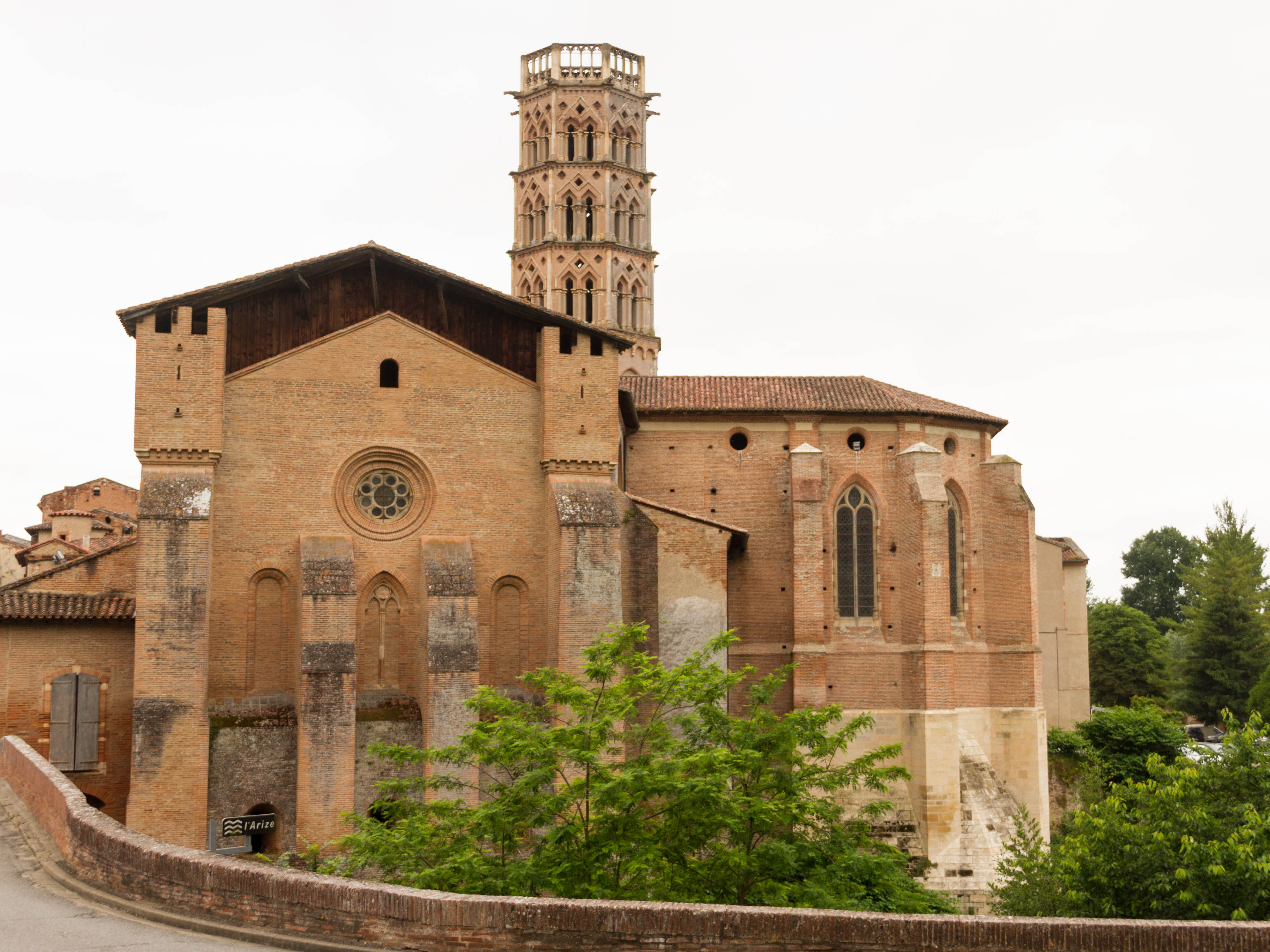 Cathédrale de la Nativité-de-Marie de Rieux